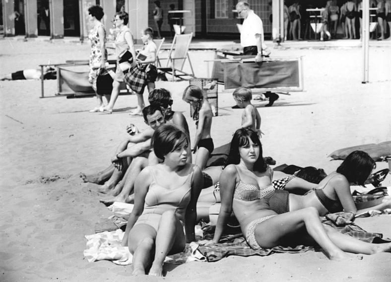 Zentralbild-Franke -ch 3.8.1968 Berlin: Frühes Erscheinen ... sicherte Bärbel, Marlies und Heidi (v.l.n.r.) diesen sonnigen Platz im Strandbad Müggelsee.